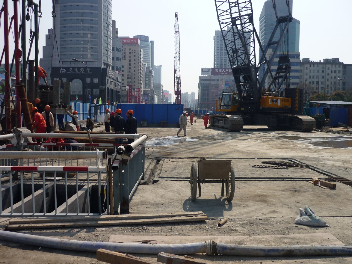 建设中的轨道交通鼓楼站